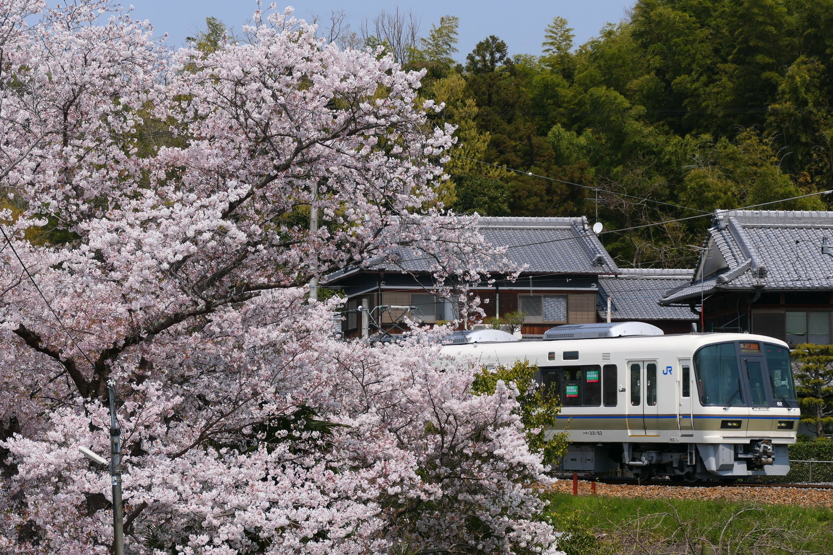 奈良線内を走行する221系みやこ路快速